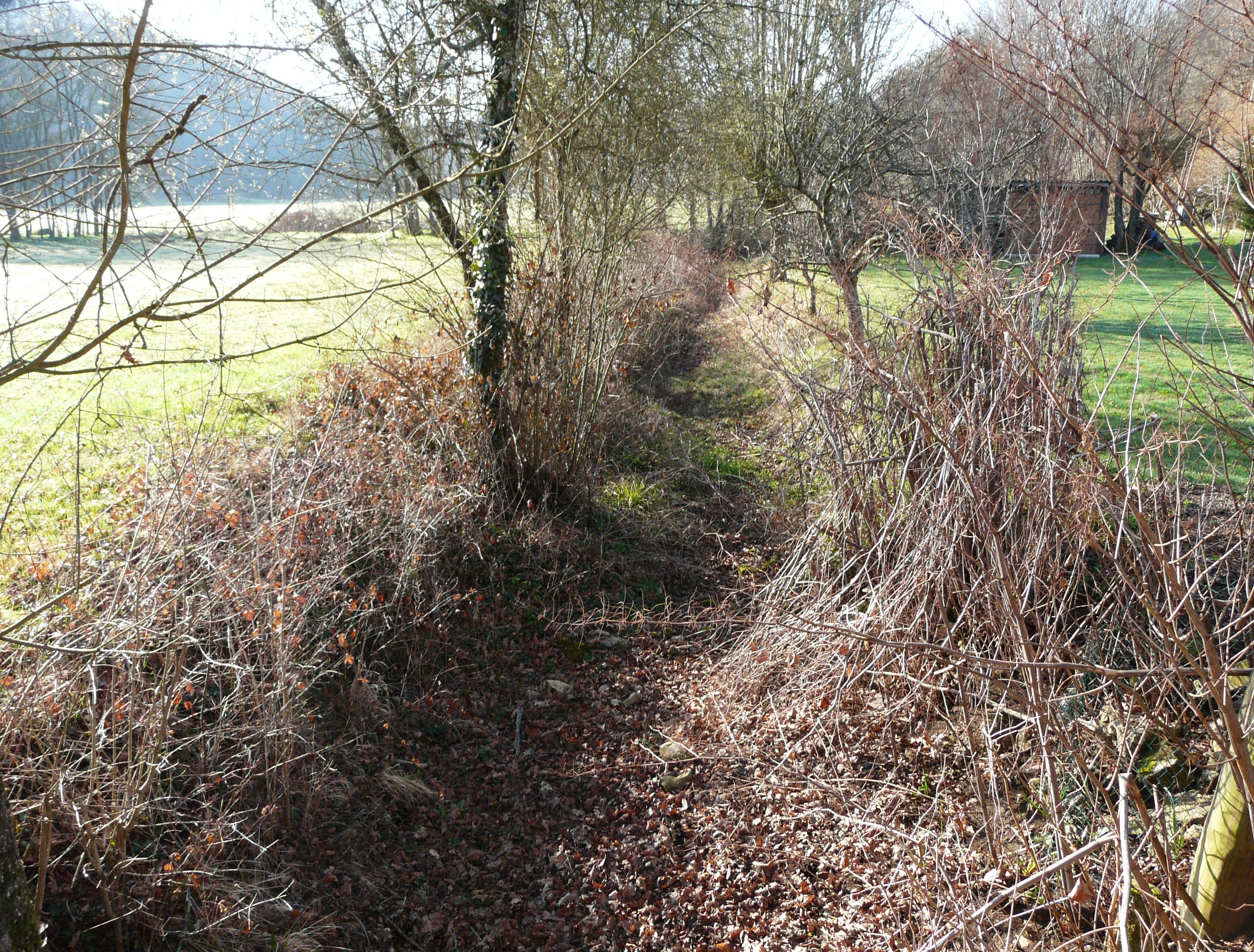 Près des Taupinies, le lit à sec du ruisseau de Saint-Geyrac marque la limite entre Saint-Pierre-de-Chignac (à gauche) et La Douze (à droite), Dordogne, France. Vue prise en direction de l'amont.